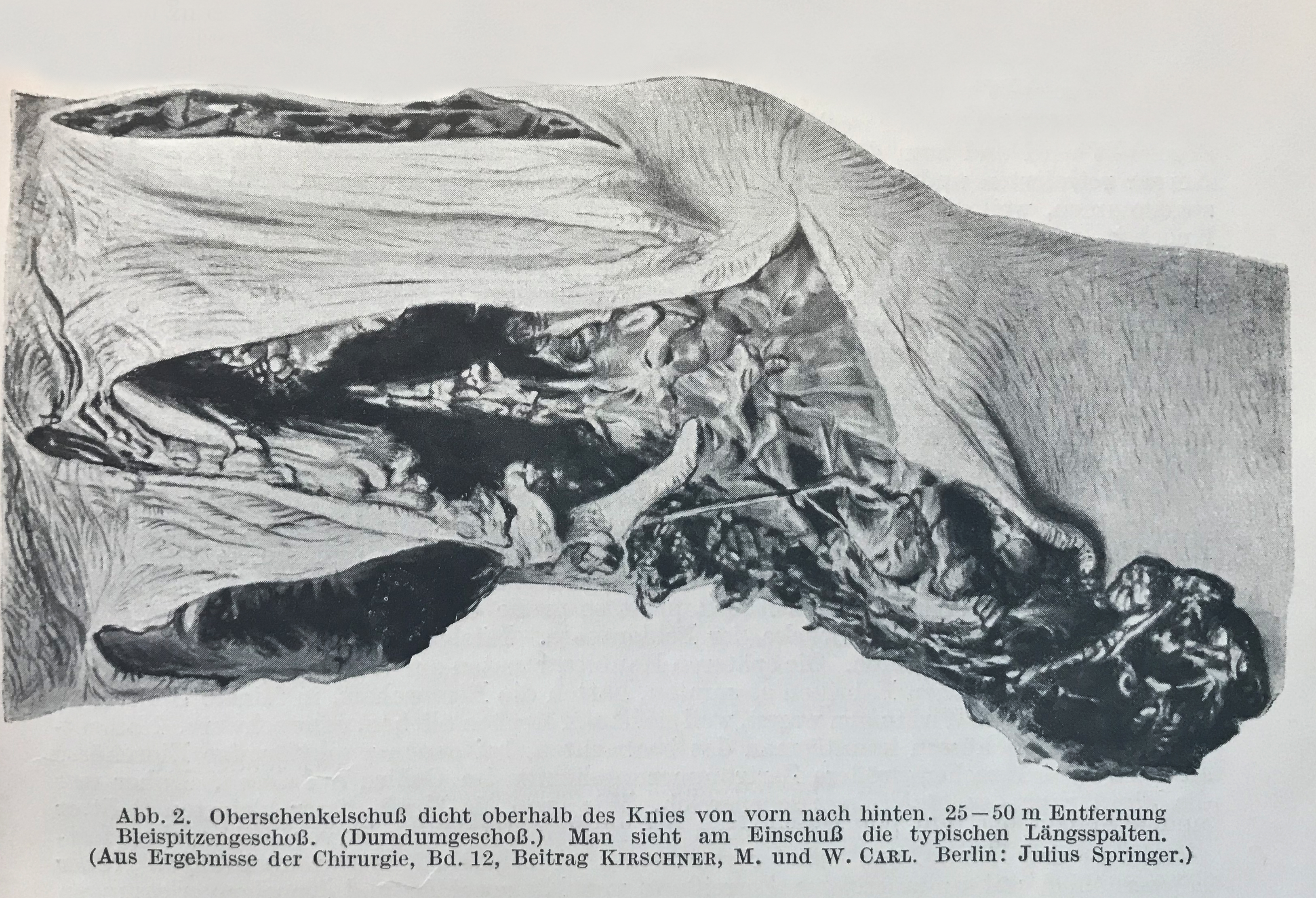 Darstellung einer Verwundung durch DumDum-Geschoß